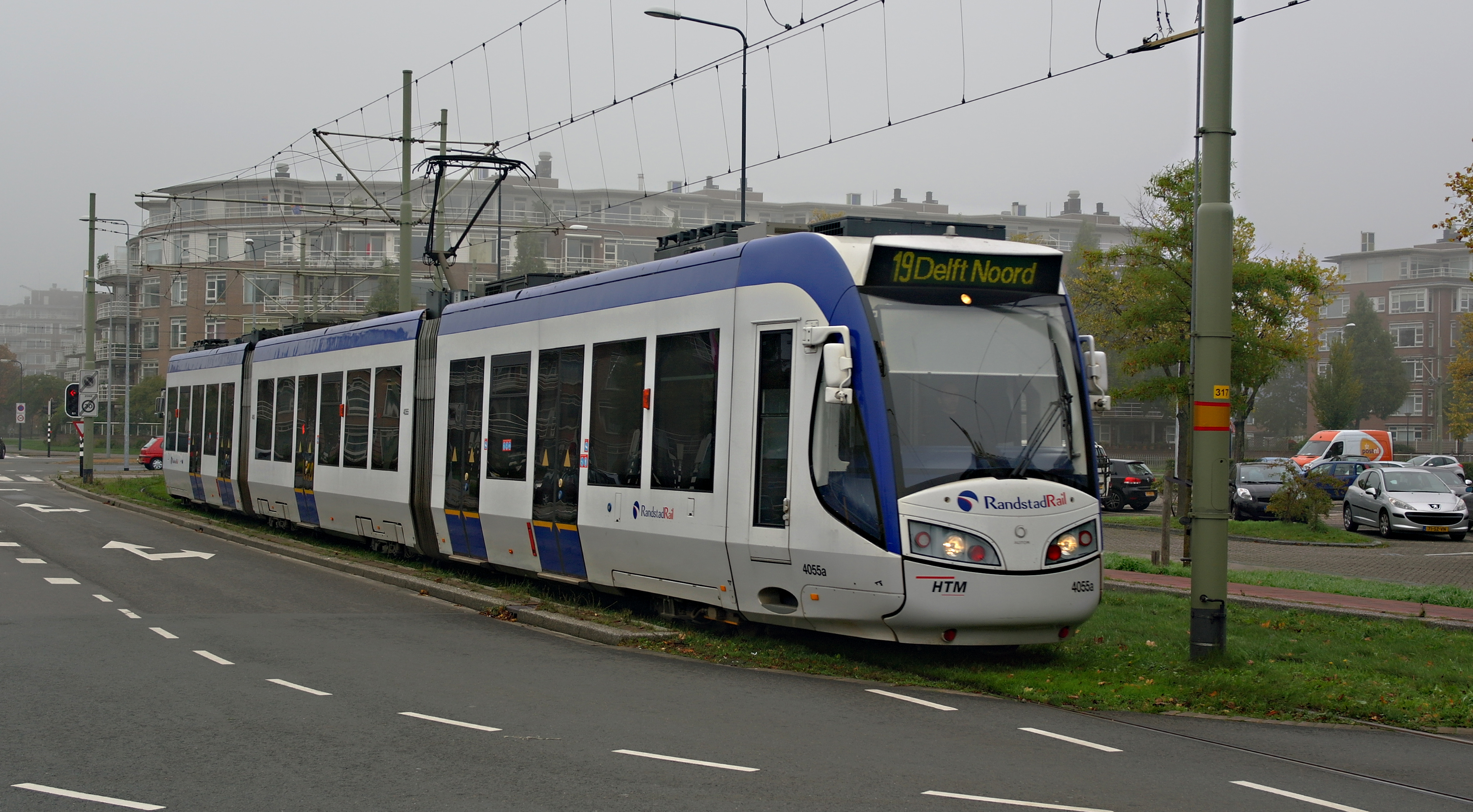 Regio Citadis op weg naar Delft Noord, 18 oktober 2013